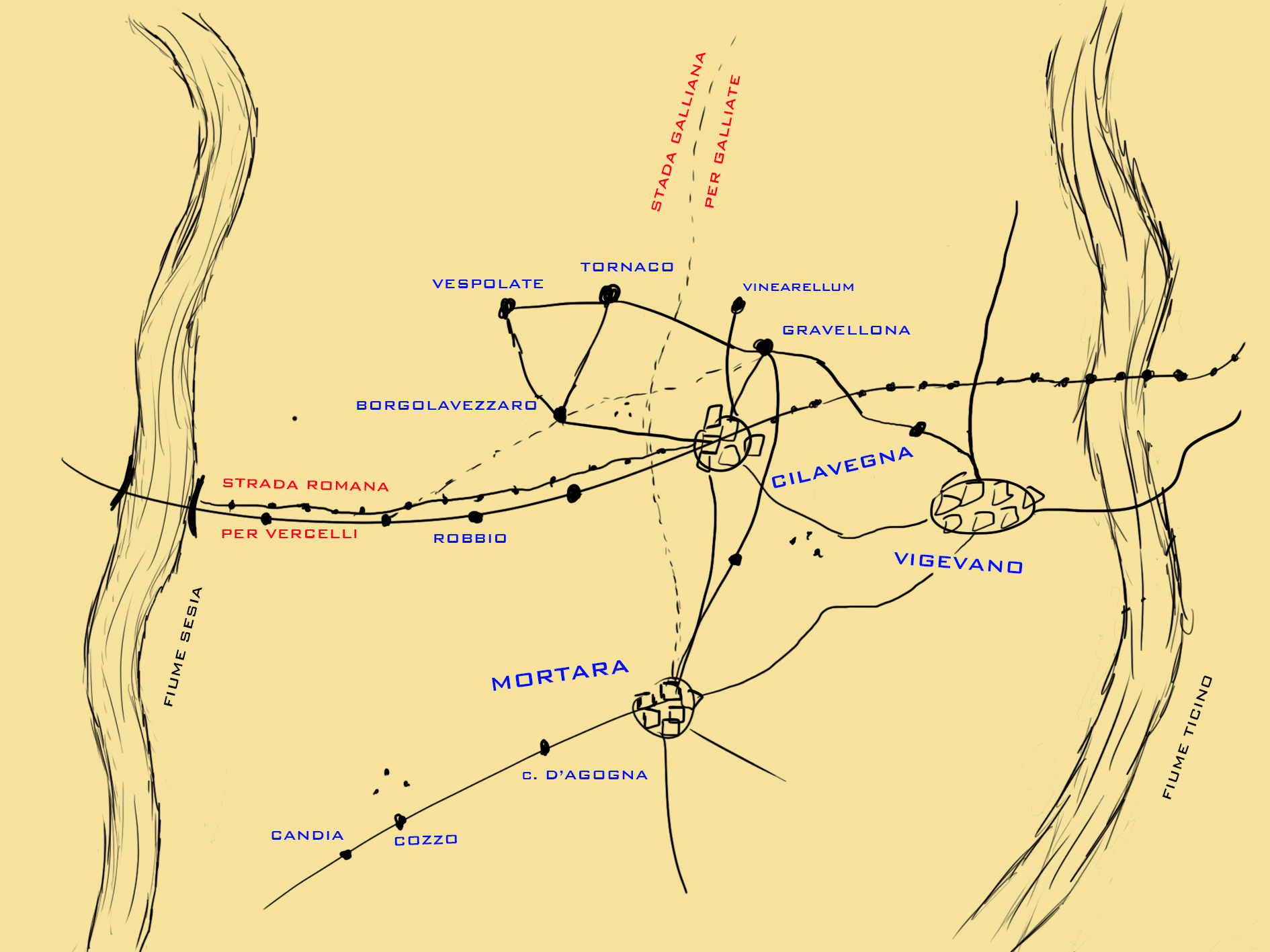 Riproduzione (con nome moderni) della mappa collocata nella concessione di Berengario I